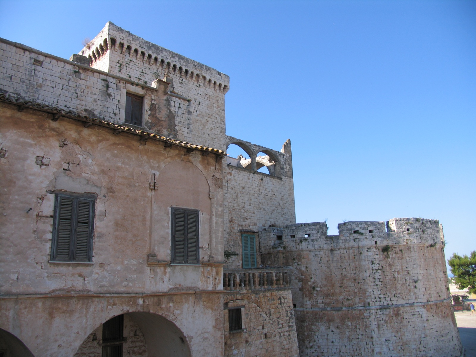 Conversano, Puglia, Italia